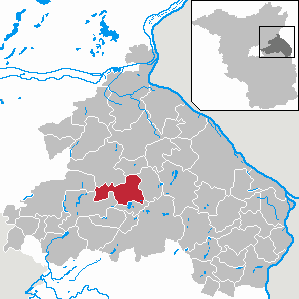 Oberbarnim in Brandenburg (Country) - District Märkisch-Oderland